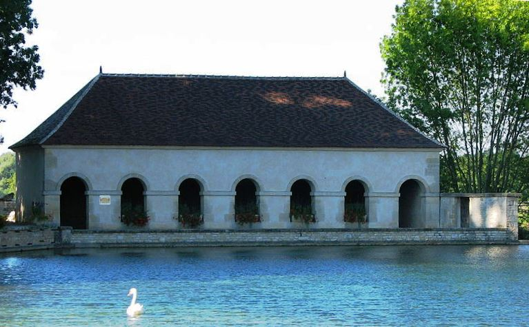 Argenteuil-sur-Armançon, Yonne. Lavoir, près du château.